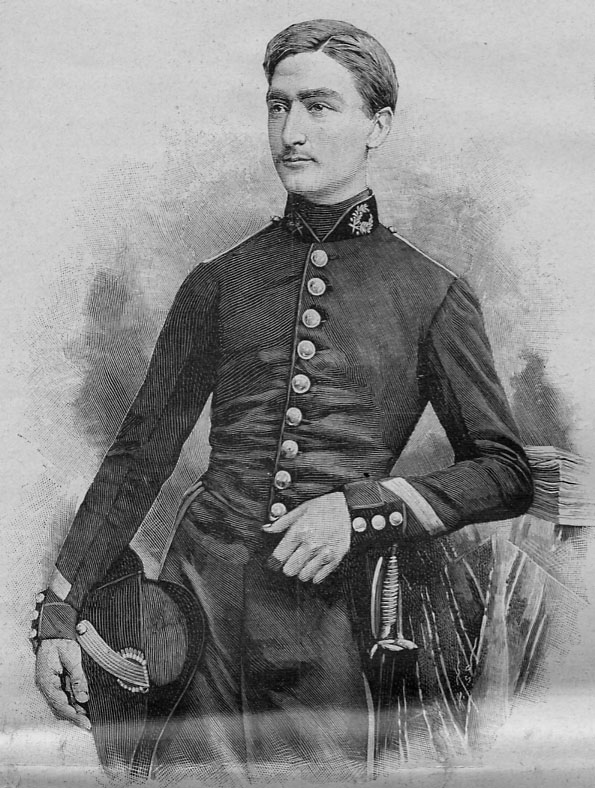 François Marie Sadi Carnot, élève de l'Ecole polytechnique (on reconnaît les galons de sergent "crotale").